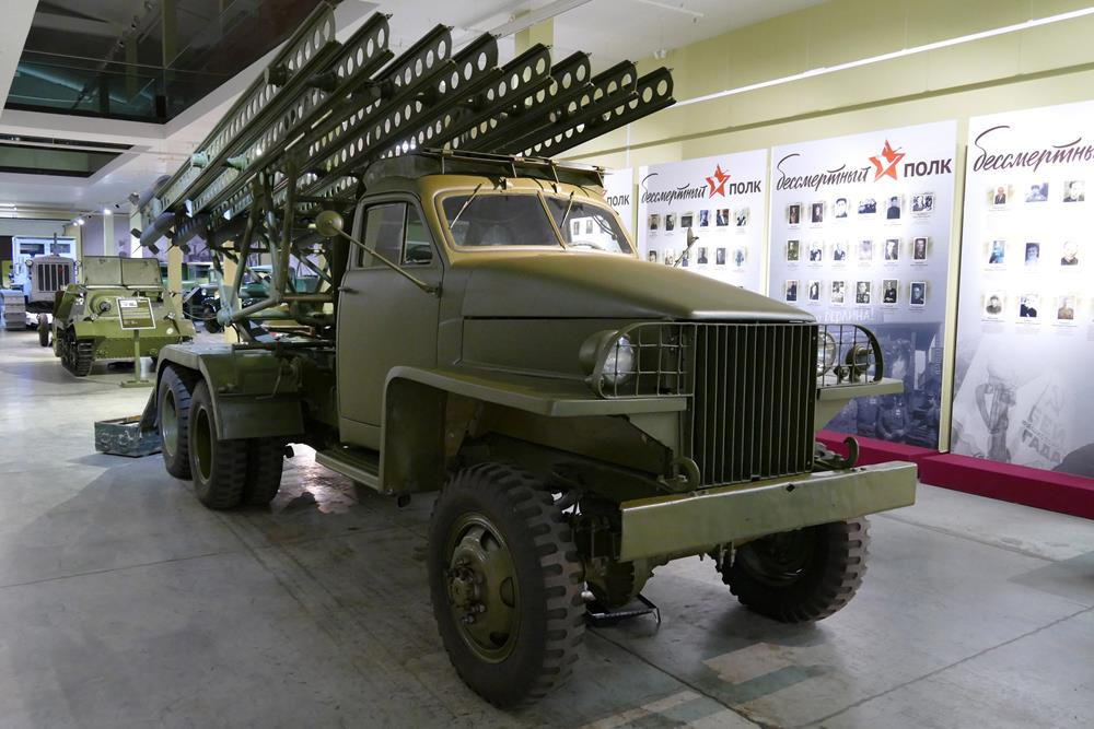 Реактивная система залпового огня БМ-13 «Катюша» в Музее отечественной военной истории